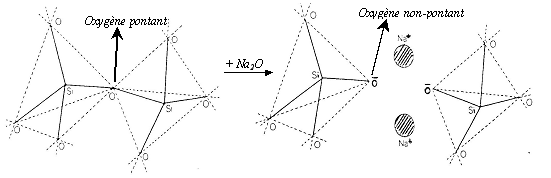 Rupture d’un pont Si-O-Si par adjonction d’une molécule de modificateur de réseau Na2O dans un verre d'oxydes